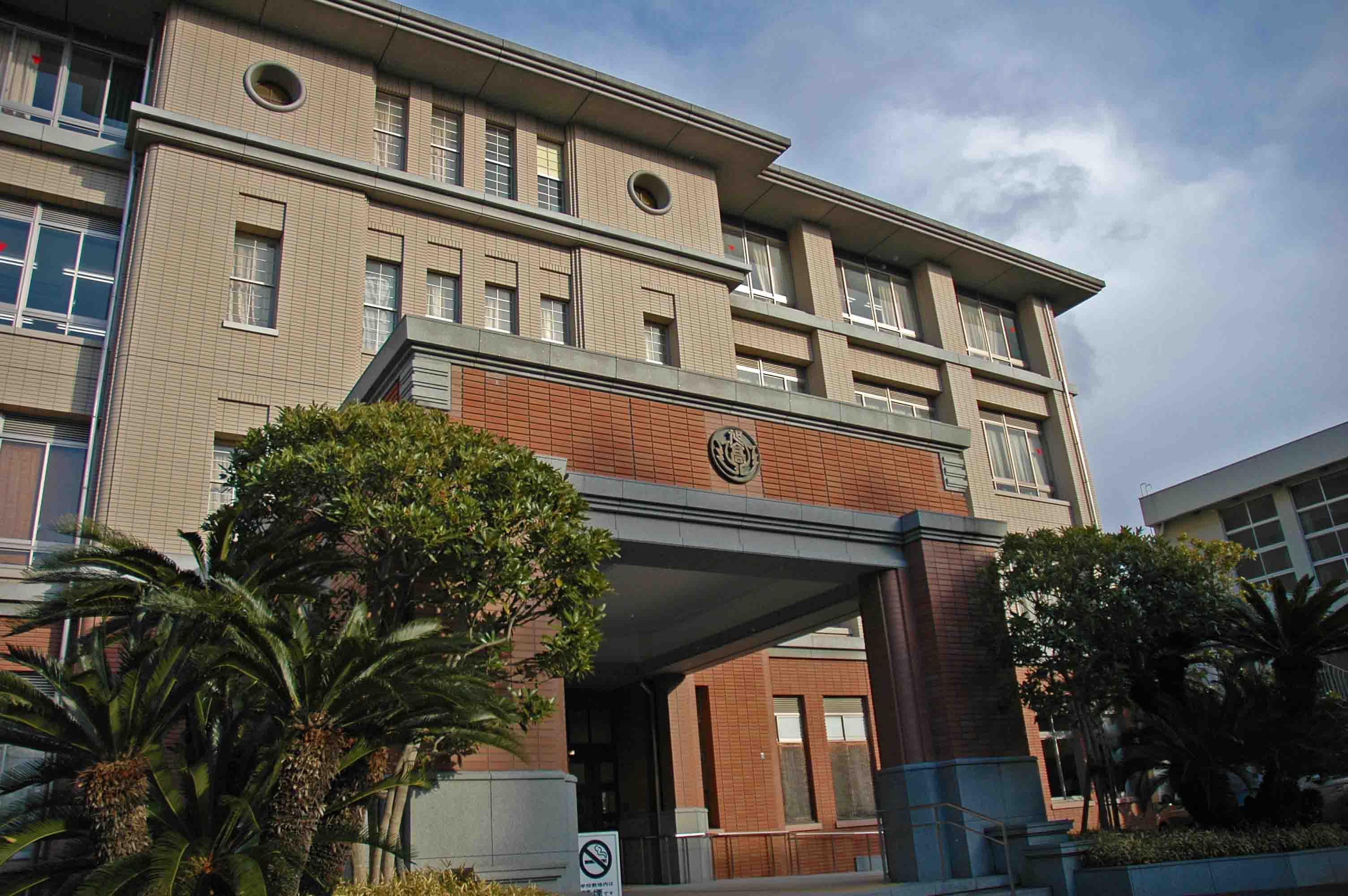 旭丘高校の正面写真